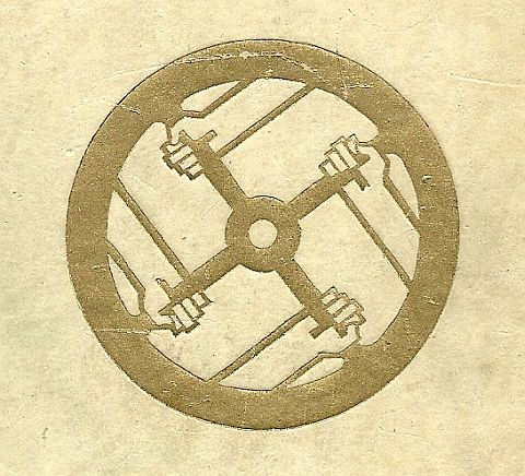 Symbol auf dem Titelbild des Buches "Die Mission des Mittelstandes", von Wilhelm und Schlüter als "das Wahrzeichen des neuen Mittelstandes" vorgesehen